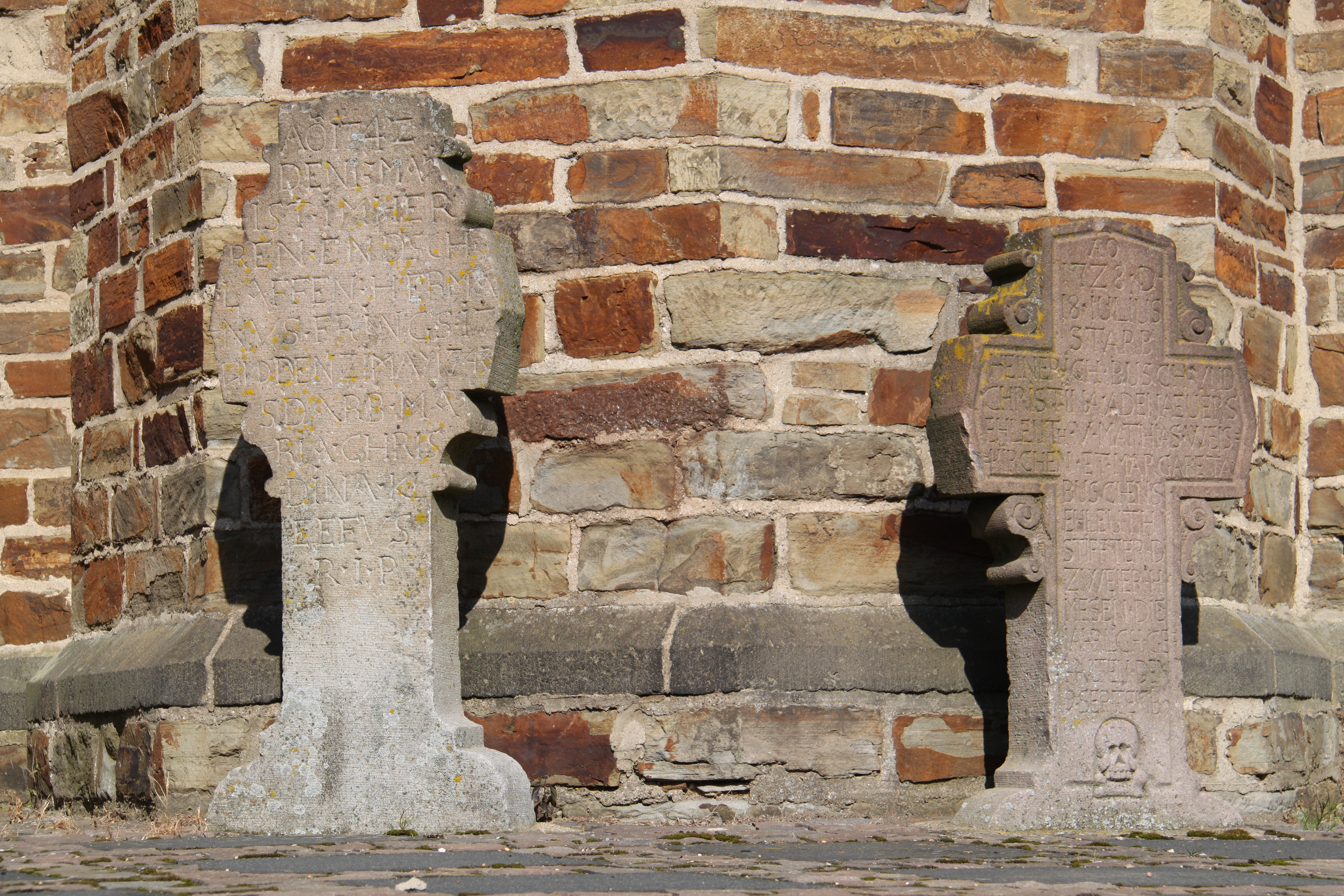 Meckenheim (Ersdorf), Pfarrkirche St. Jakobus der Ältere, Grabsteine an der Kirche